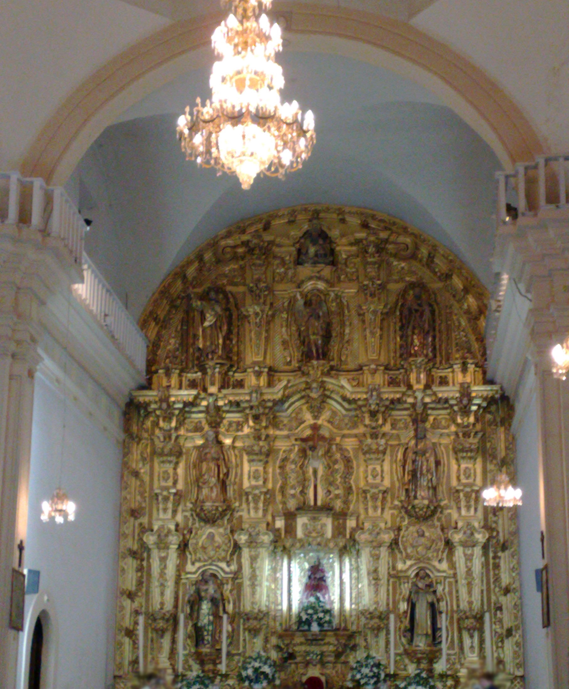 Iglesia de Nuestra Señora del Rosario, Rosario, Sinaloa, Mexico